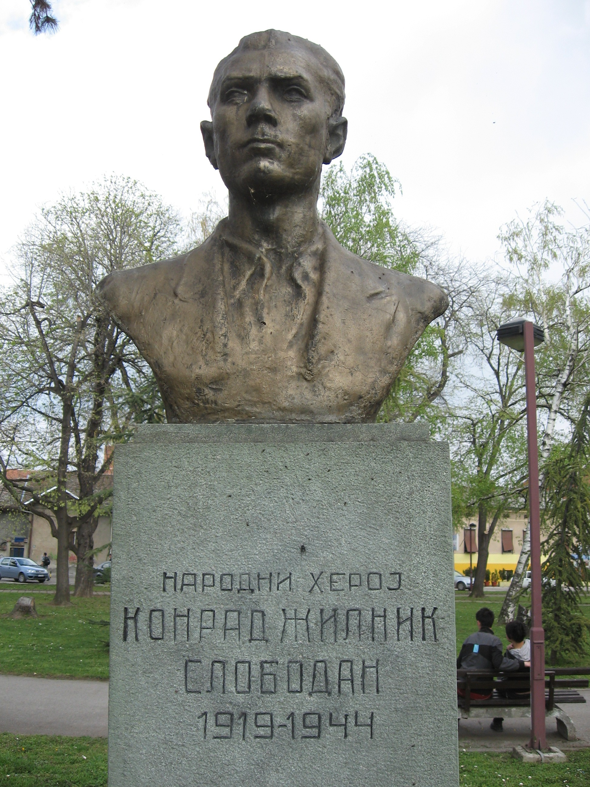 Bista Konrada Žilnika Slobodan u Nišu. Snimljeno u aprilu 2010.